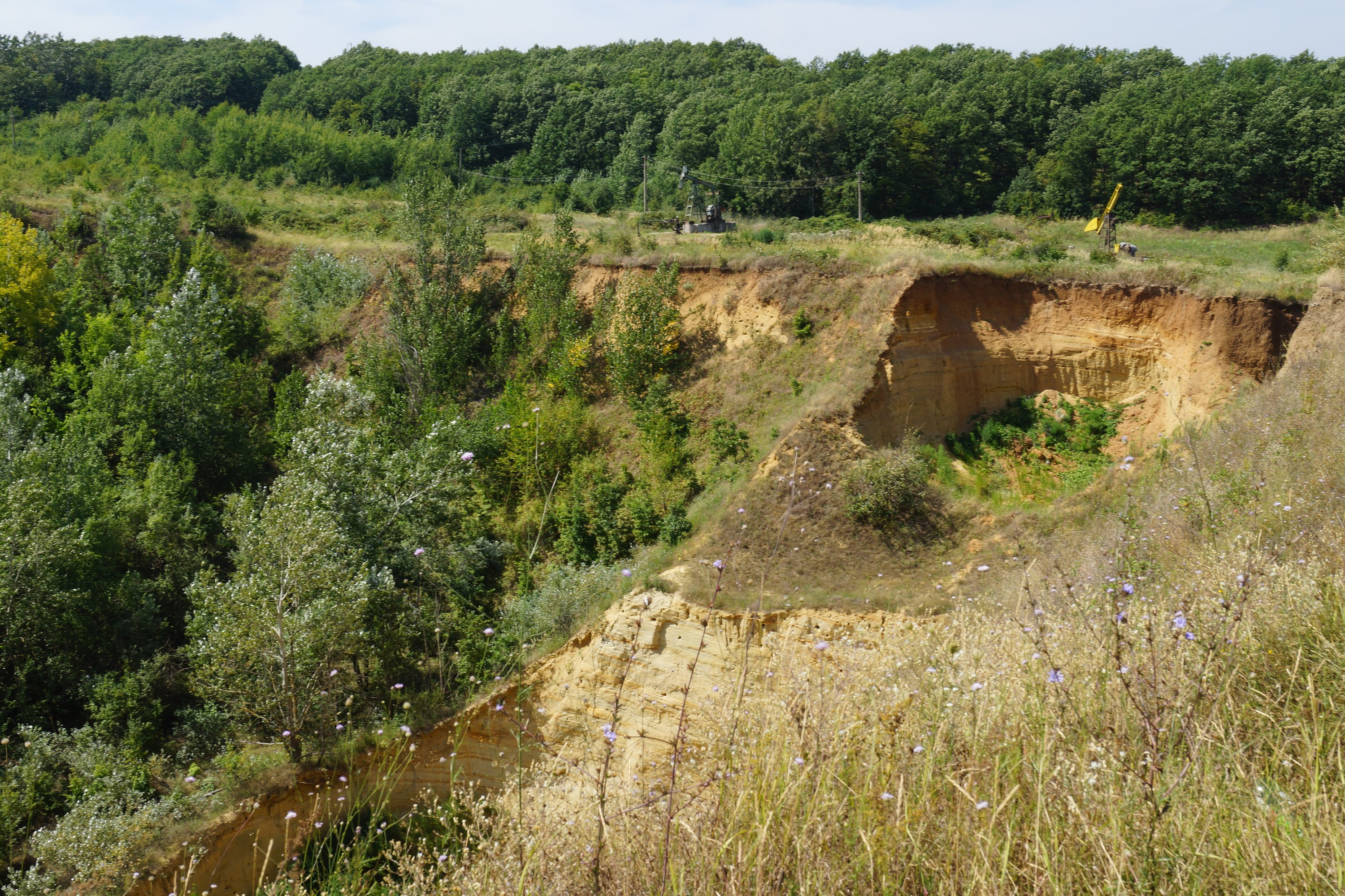 Песчаный карьер в горах за поселком Черноморским